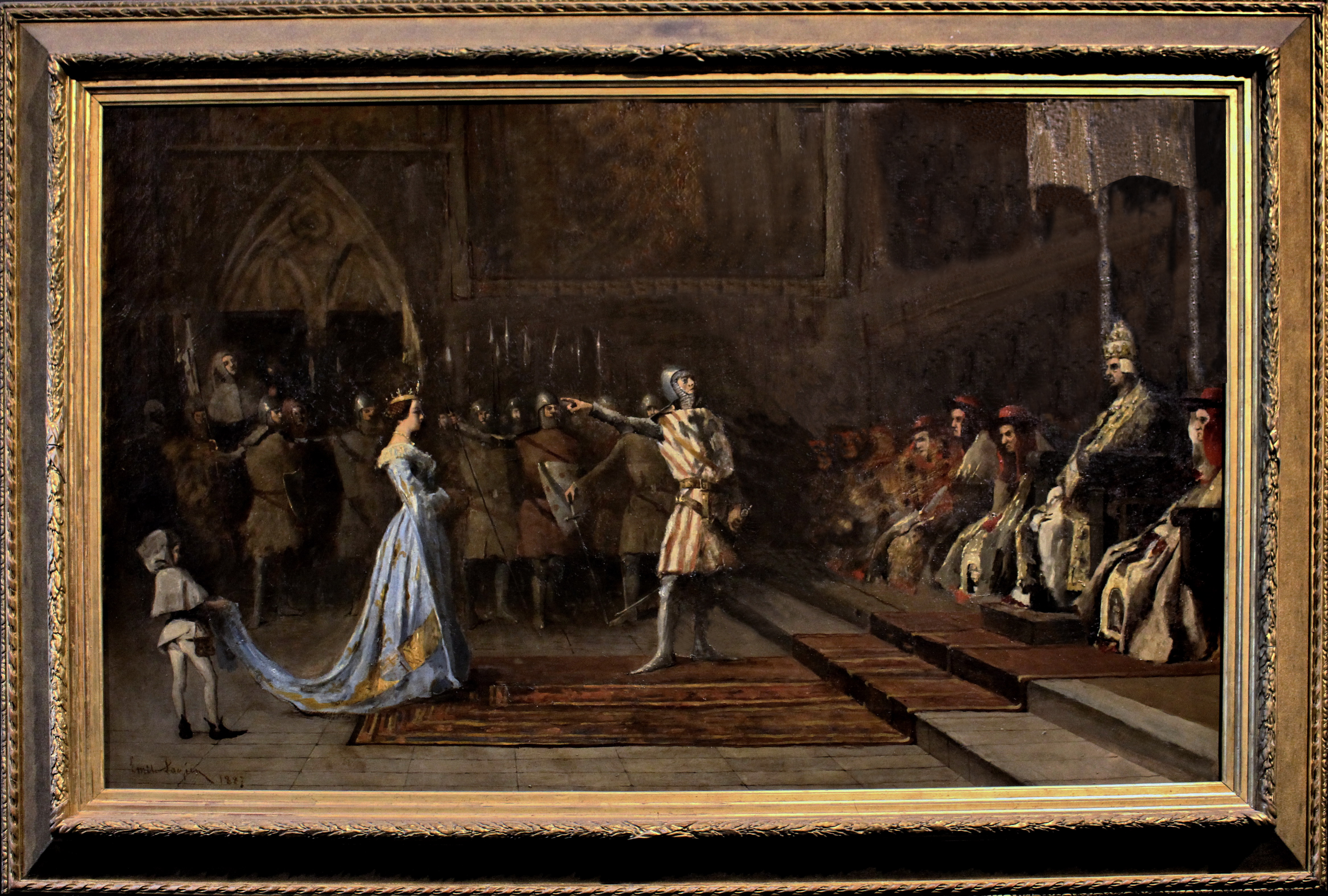 Emile Lagier, La reine Jeanne reçue par le pape Clément VI, huile sur toile avec cadre H.120 L175 cm, Don Combaz-Philipon, signé et daté, 1887, Palais des Papes d’Avignon